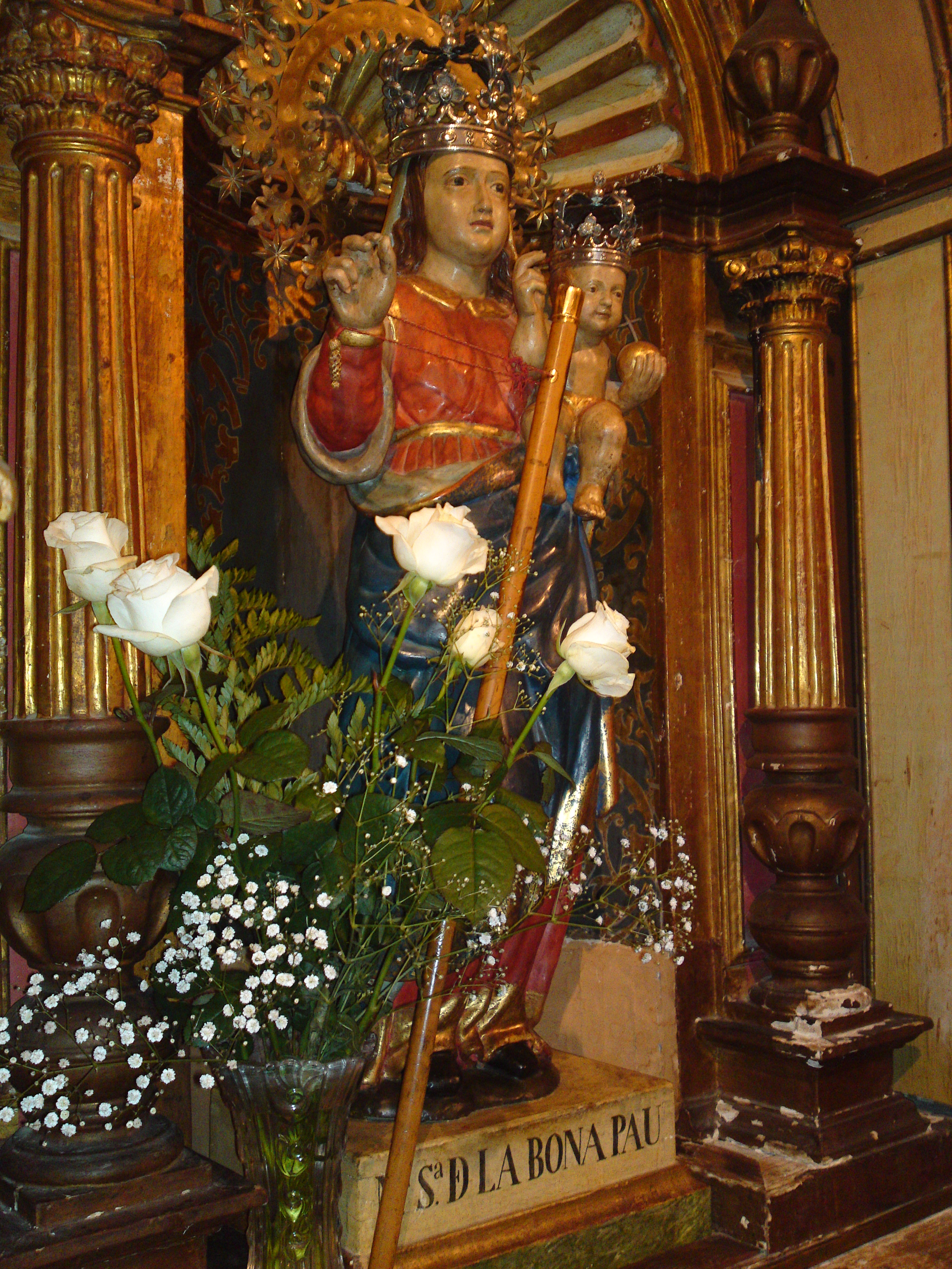 Imatge de la Mare de Déu de la Bona Pau (Montuïri) amb la vara de batle entregada pel batle del Puig el dia del pancaritat al puig de Sant Miquel (Montuïri)